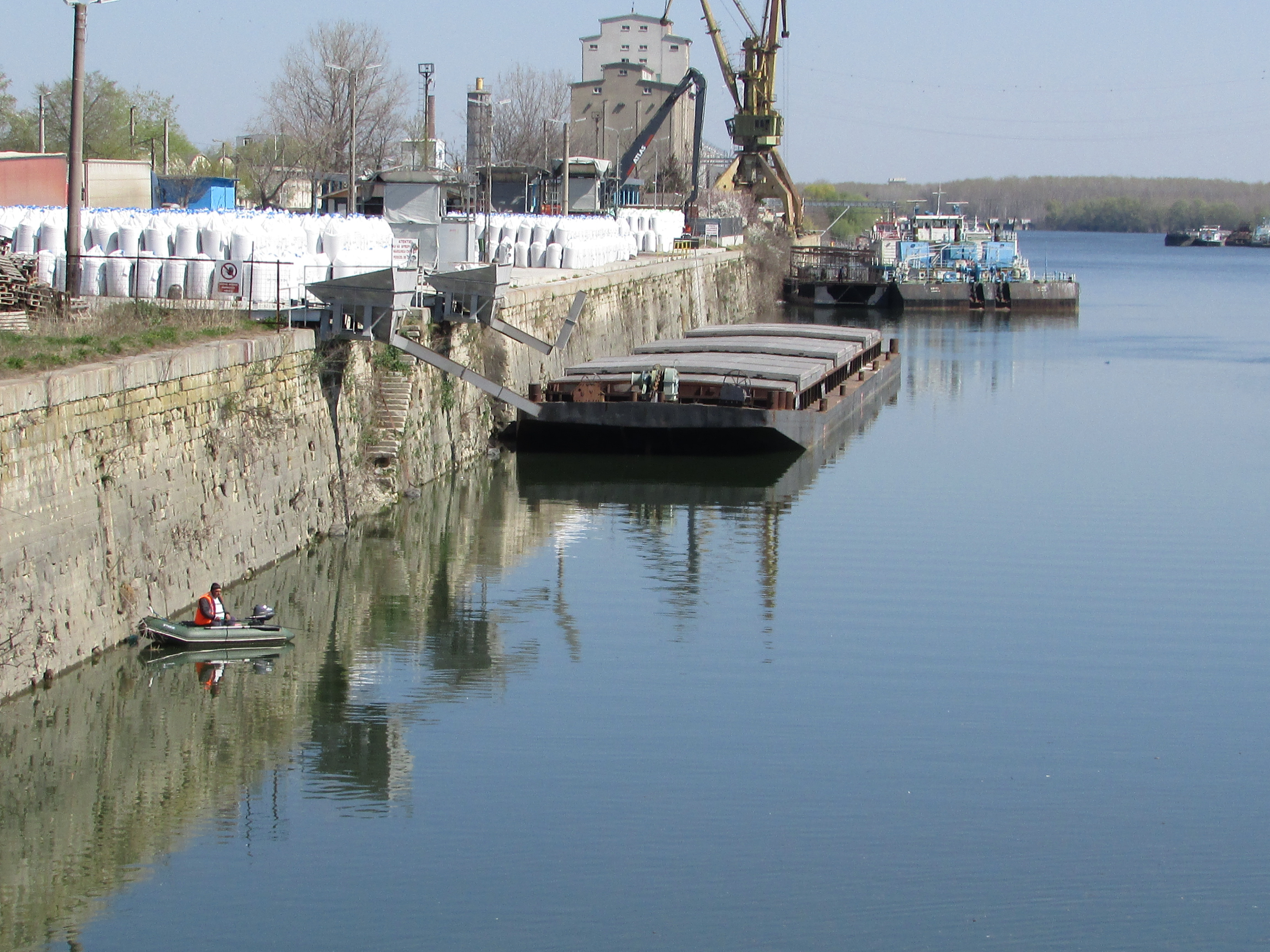 Cheiul de piatră, vedere de pe podul Bizetz